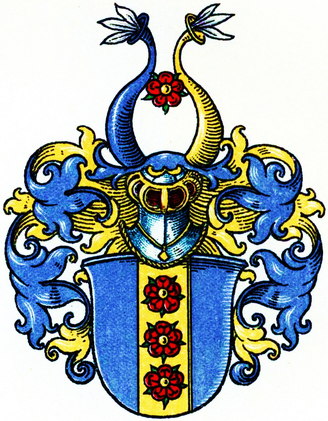 Wappen der von Rintel(e)n zu Hannover und Lübeck